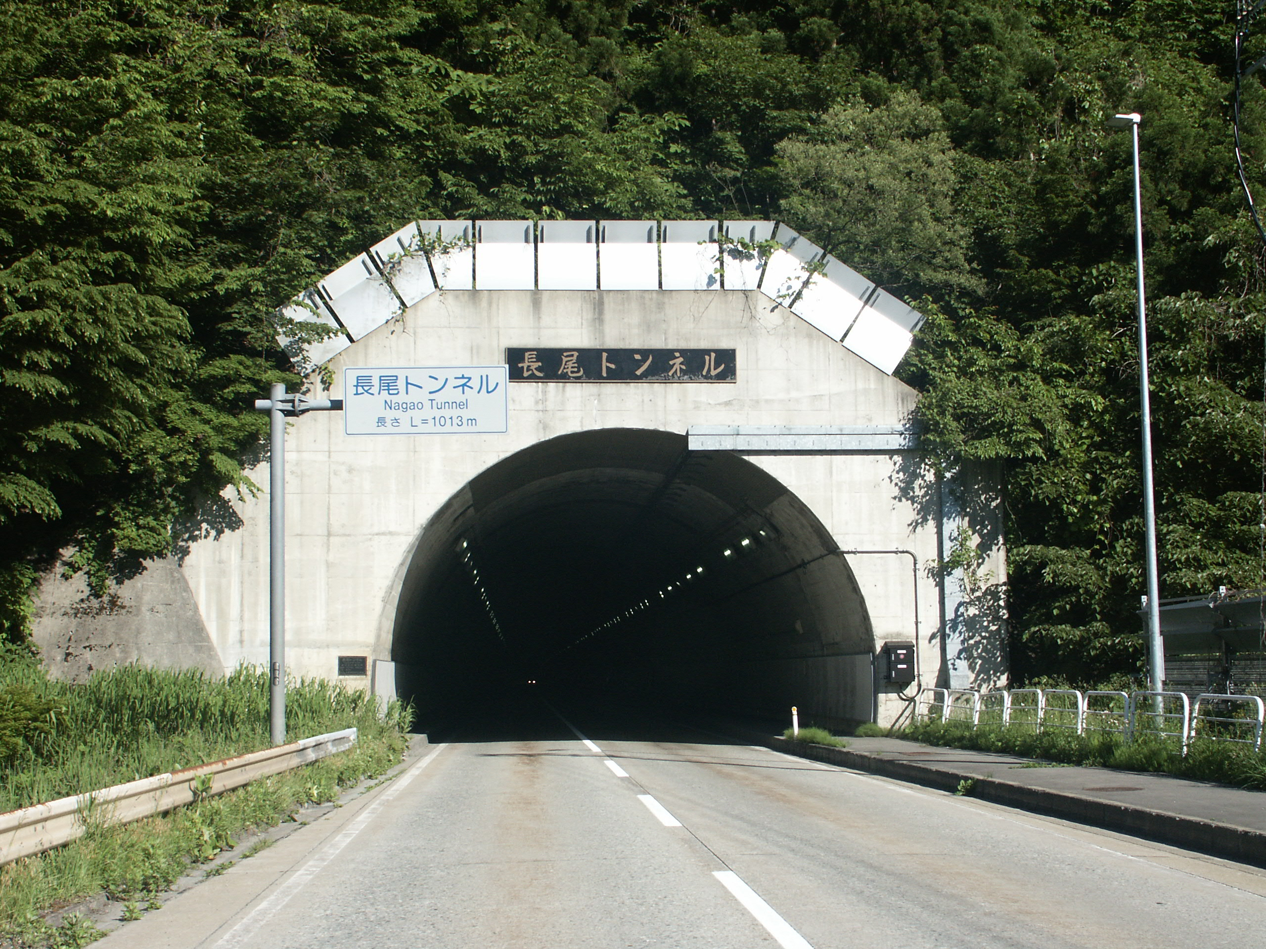 国道47号線亀割バイパス長尾トンネル（新庄方面側より撮影）